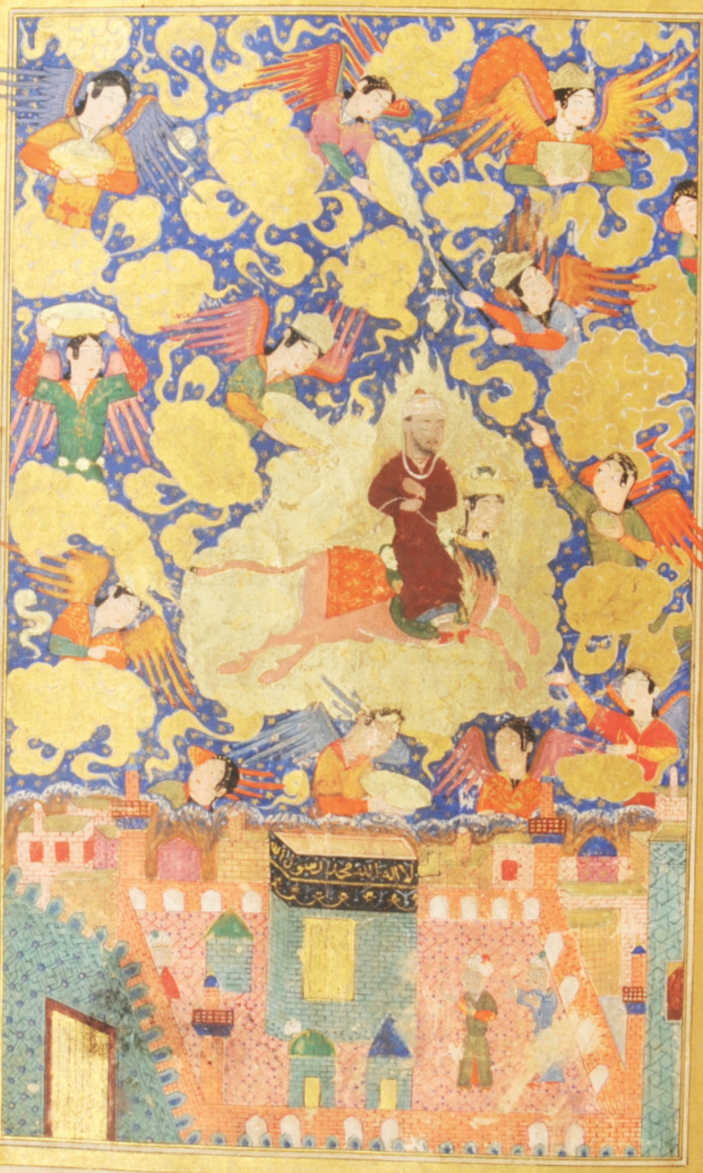 Иллюстрация из Книги "Искандернаме" Ахмеди. Библиотека Марсиана, Венеция.